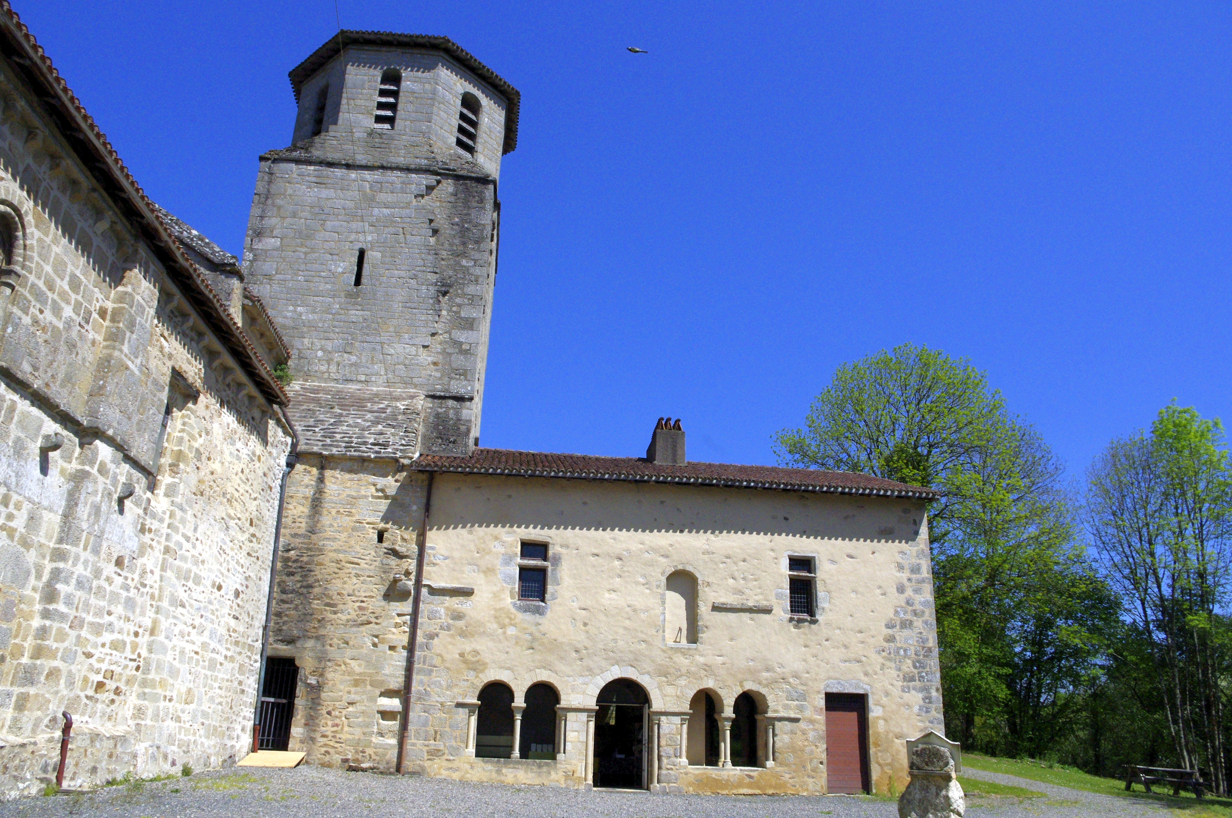 L'église Saint Eutrope et le prieuré des Salles-Lavauguyon, Haute-Vienne, France.